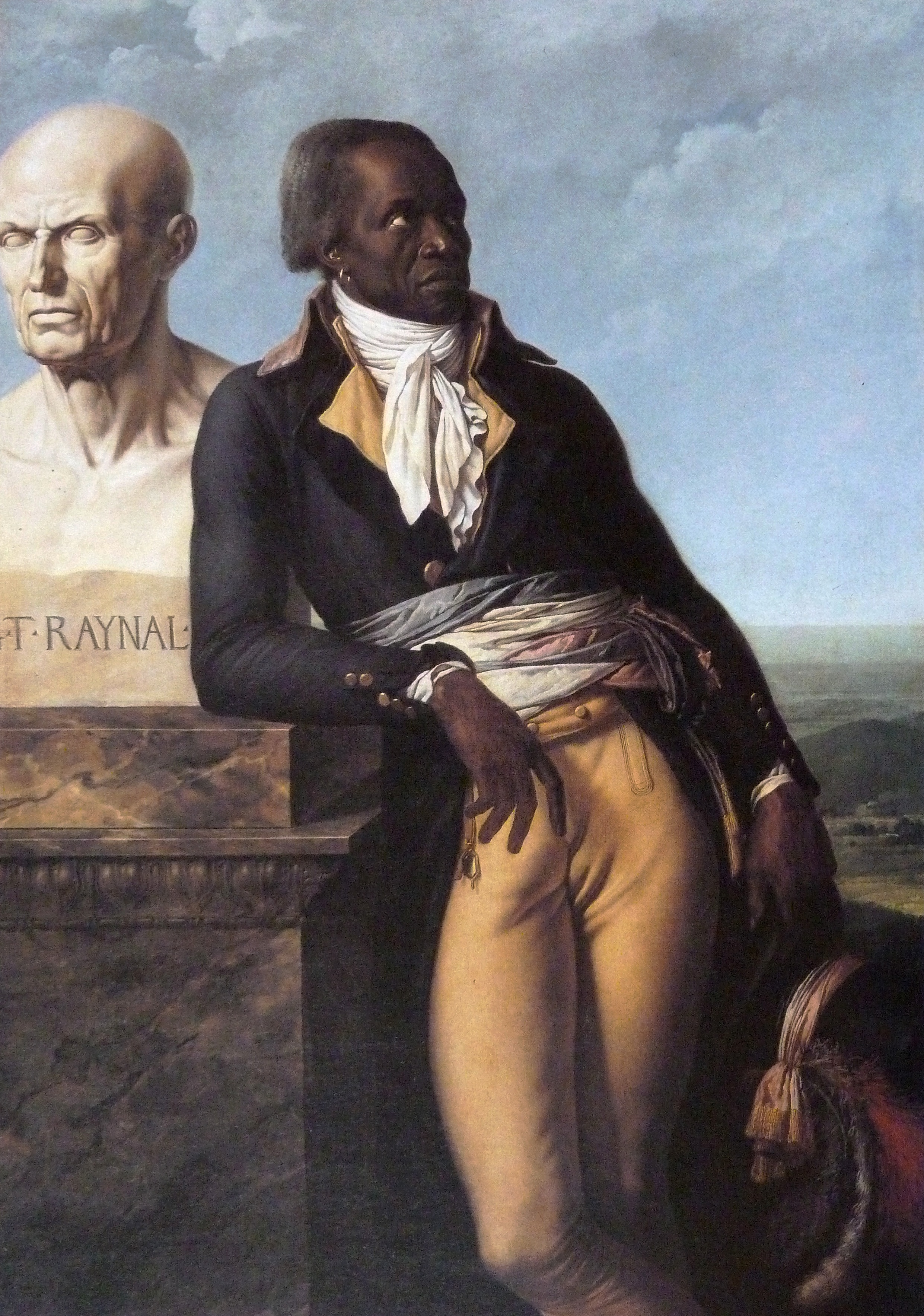 Portrait du citoyen Belley, ex-représentnat des colonies - Publié dans "Aux armes et aux Arts", Adam Biro, 1988.